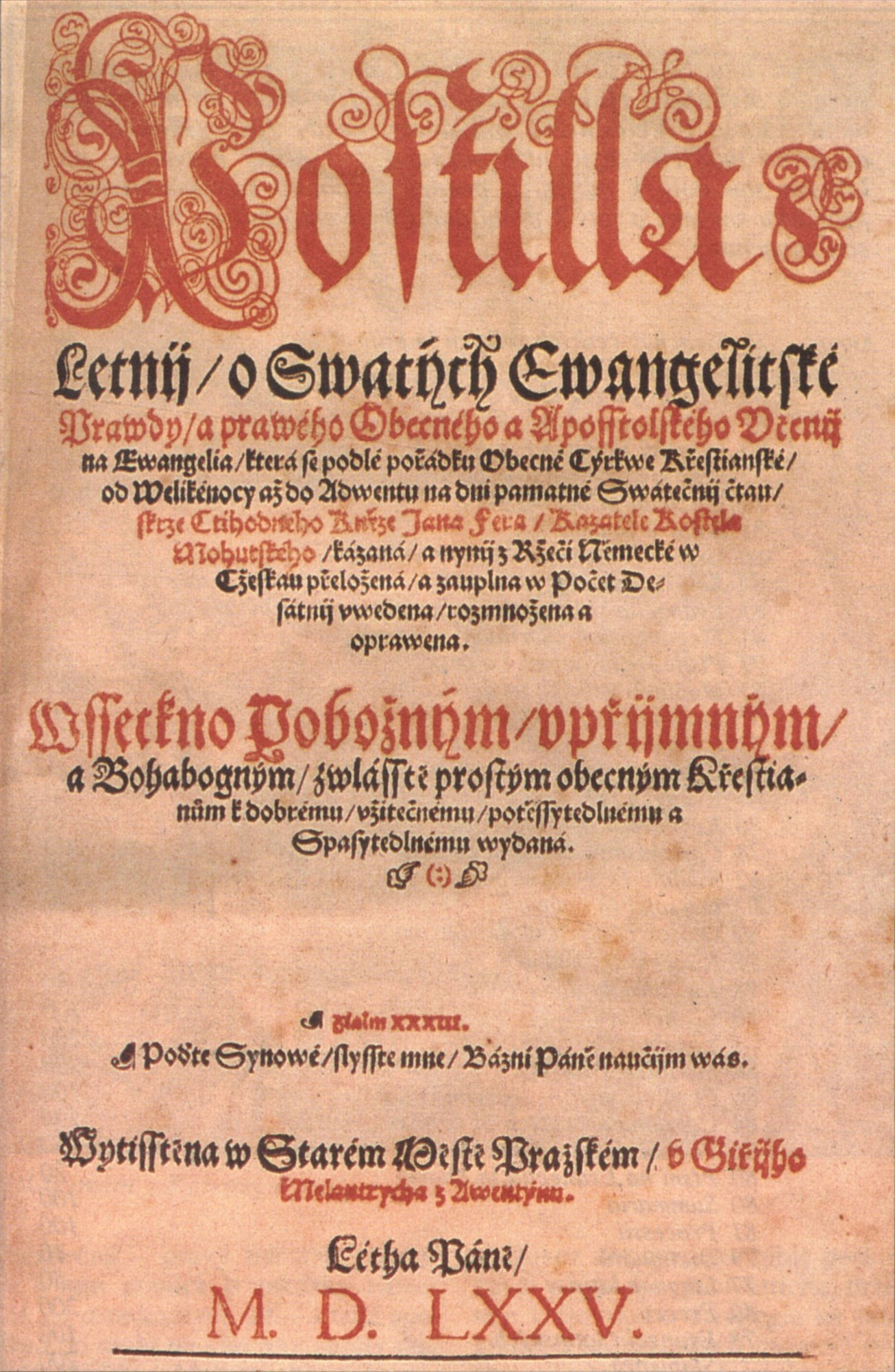 Titulní Postily Jana Ferra z roku 1575